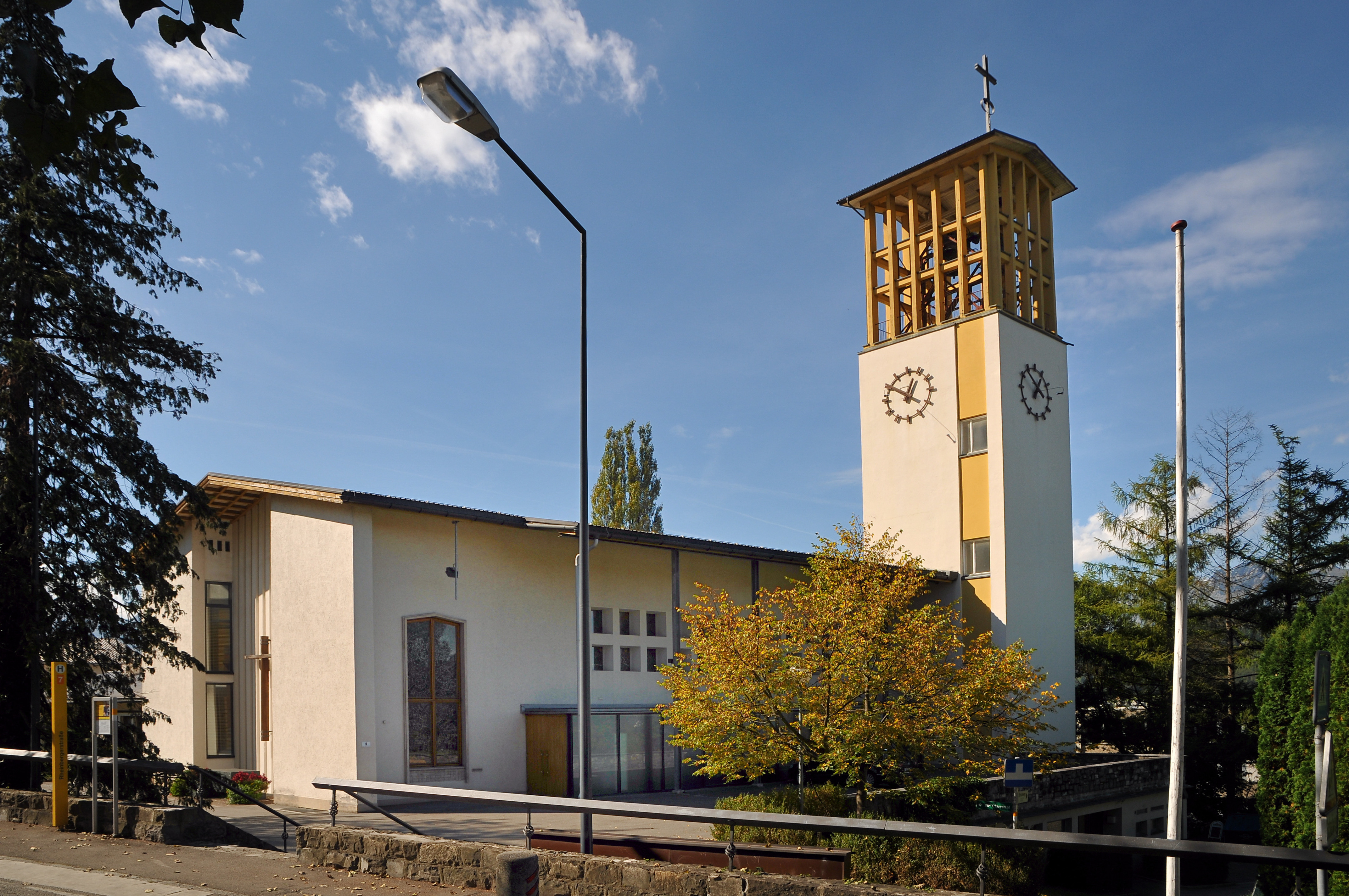 Pfarrkirche Heilige Familie in Tisis, Feldkirch.